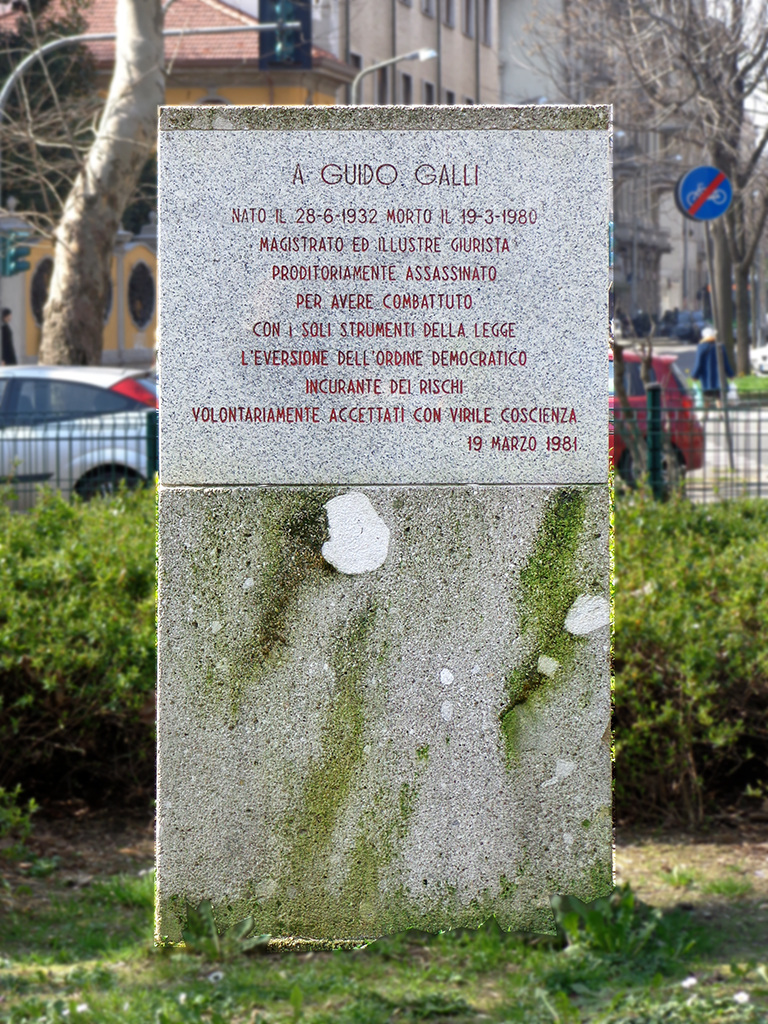 Milano, stele in memoria di Guido Galli in piazzale Susa.